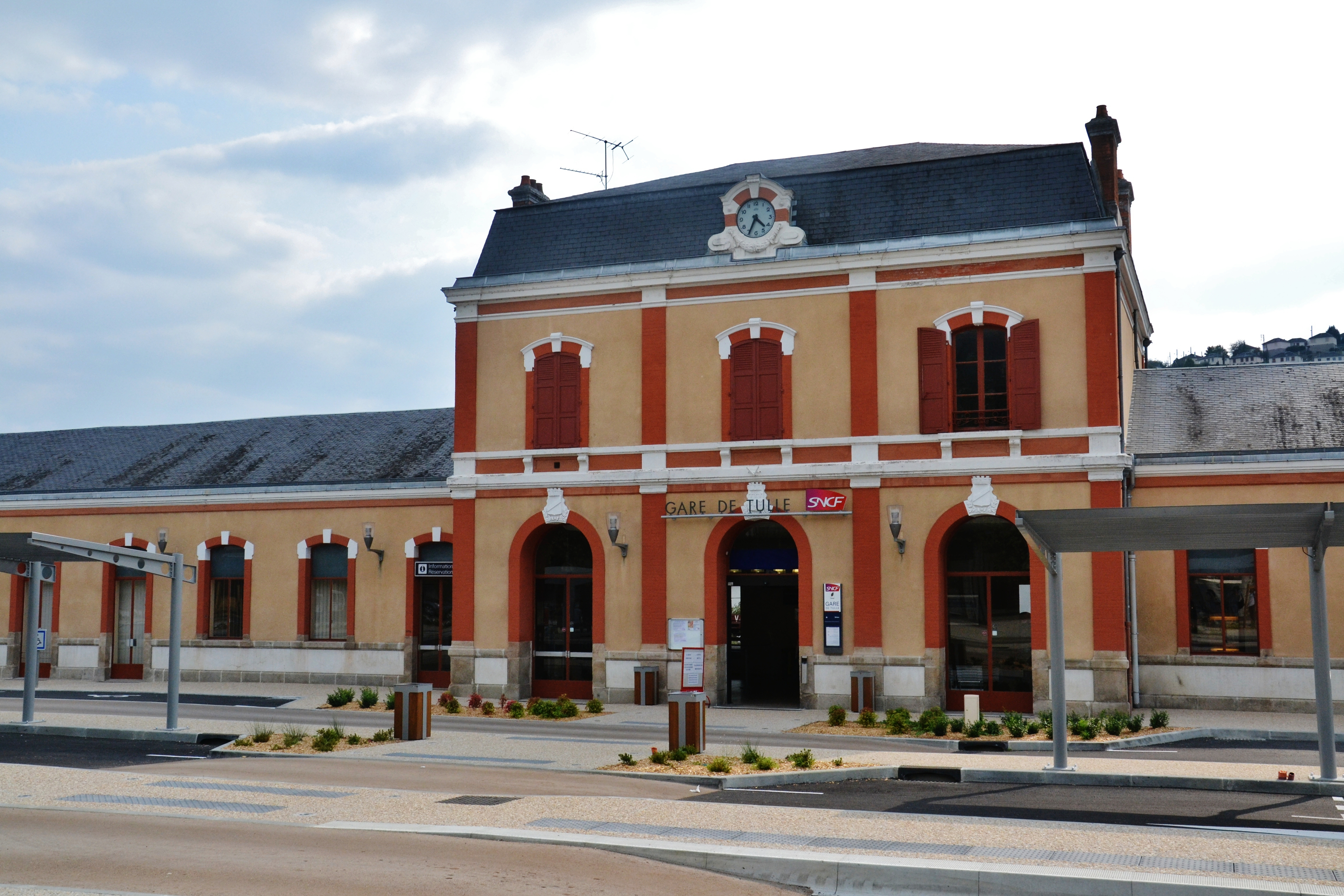 Gare ferroviaire de Tulle (Corrèze, France)